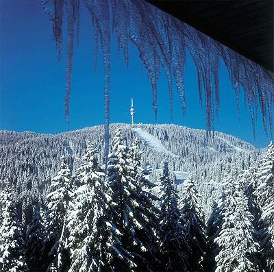 Връх Снежанка 1926м.н.в.